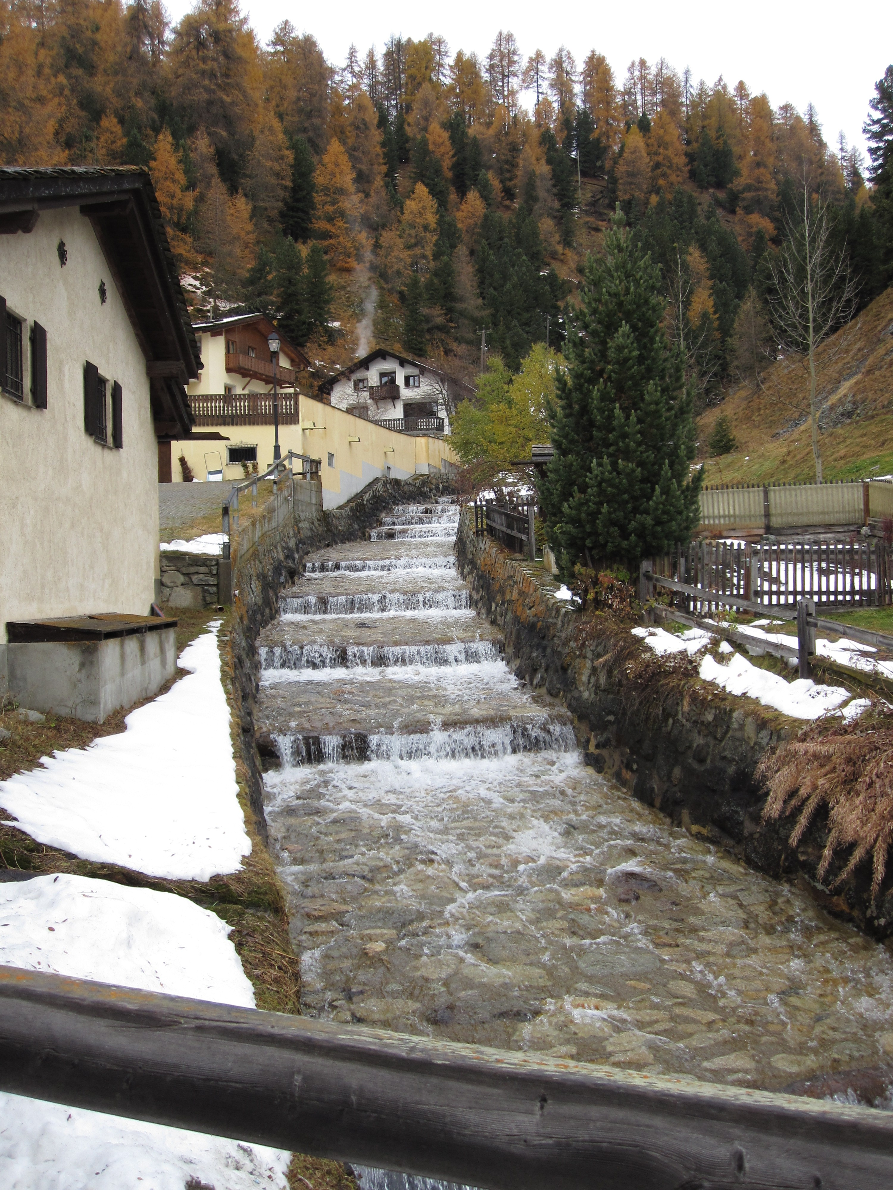 der Fluss Ova da Suvretta in Champfèr (Oberengadin, Kanton Graubünden)